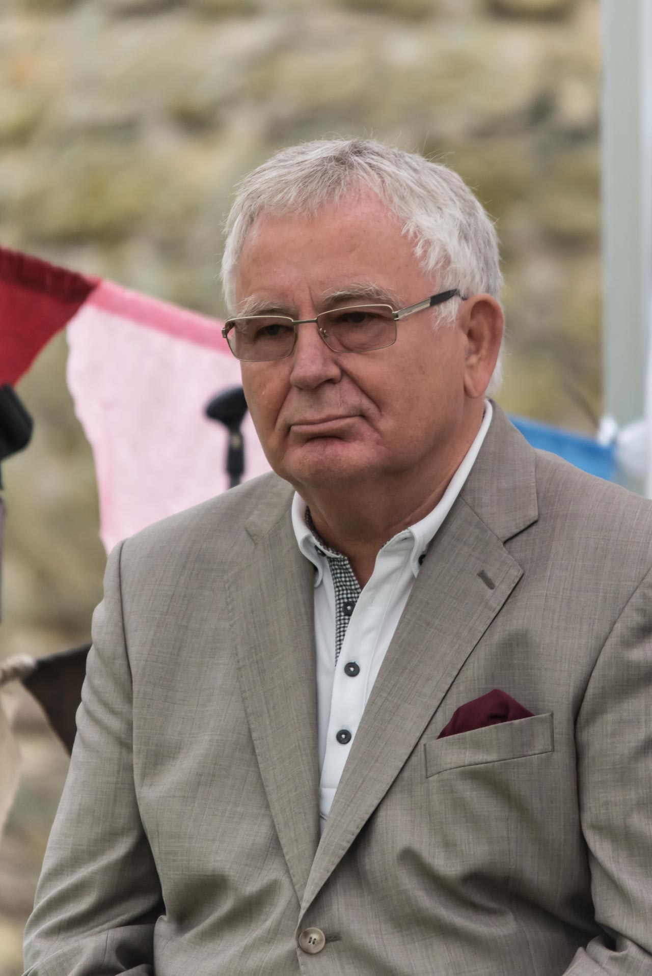 Tiit Vähi teisel Arvamusfestivalil Narvas. Arutelu teemaks "Sa vaene hüljatud Ida-Virumaa".